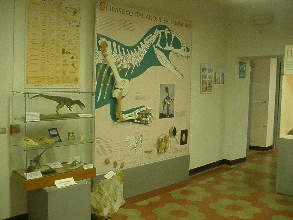 Museo Fossili Besano 3